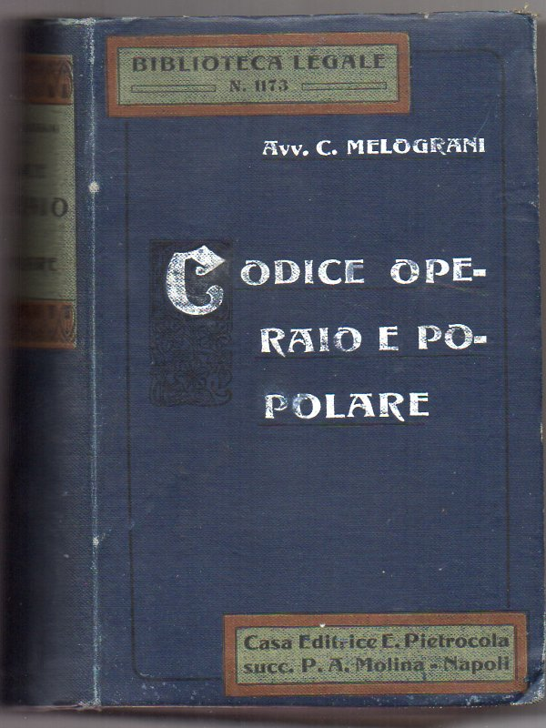 1911, Biblioteca Legale N.1173 Codice operaio e popolare